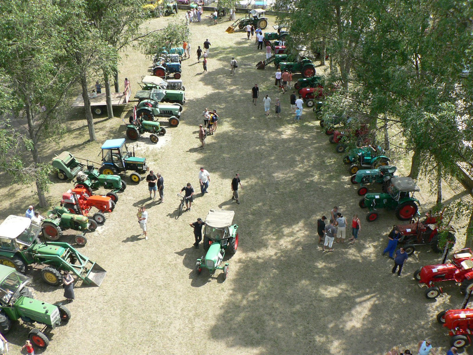 Traktortalálkozó (2007)